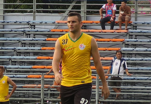 Leandro de Oliveira da Luz